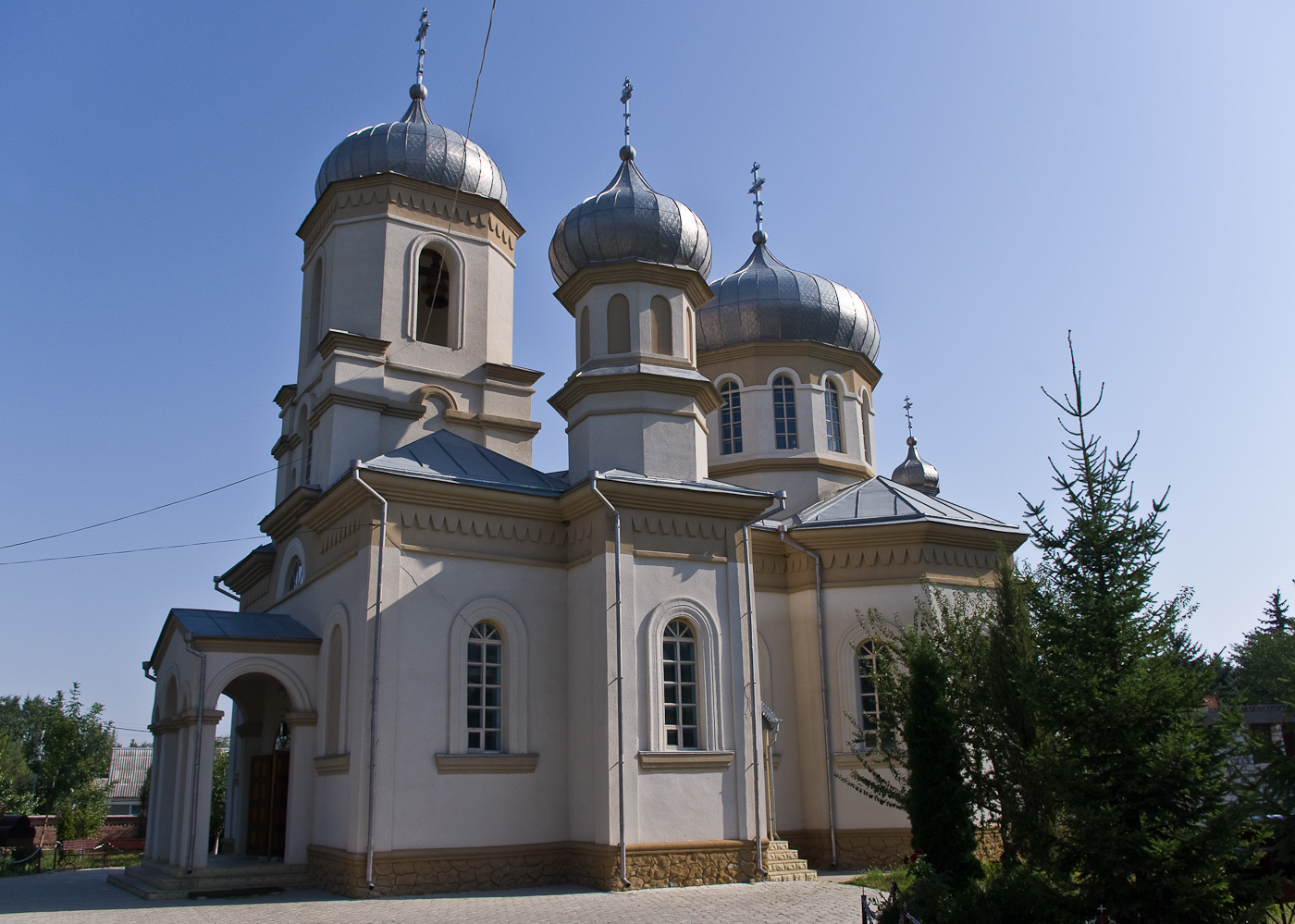 Во внутреннем дворике есть колодец, из которого может попить воду любой желающий. Что было очень хорошо для меня во время летней (жаркой) прогулки по Новым Аненам.